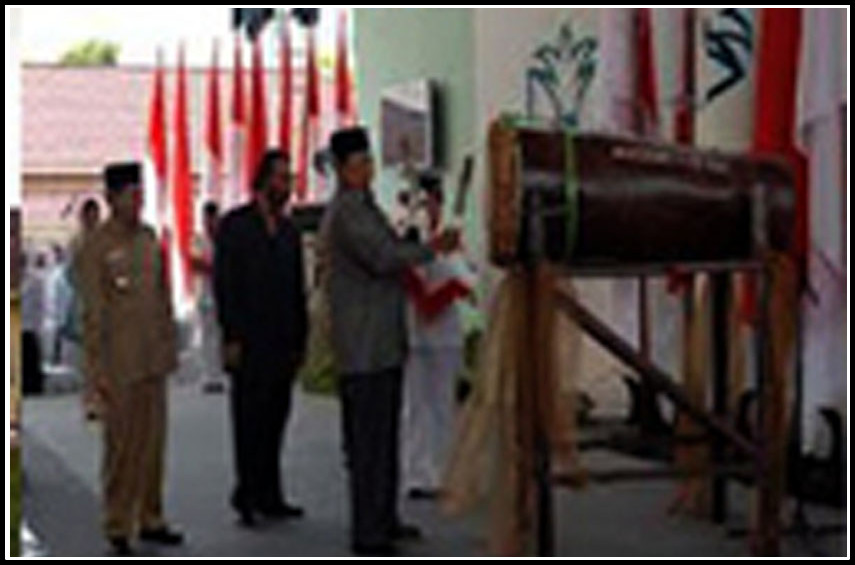 Bapak Susilo Bambang Yudhoyono saat meresmikan SMA Negeri Unggul Unggulan Sukma Nias